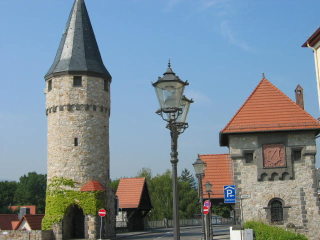 Ritter von Marx Brücke, Bad Homburg